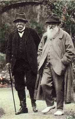 Georges Clemenceau et Claude Monet dans le jardin de Giverny en compagnie de Blanche Hoschedé-Monet, du collectionneur Matsukata Kôjrô et de sa nièce Madame Kuroki